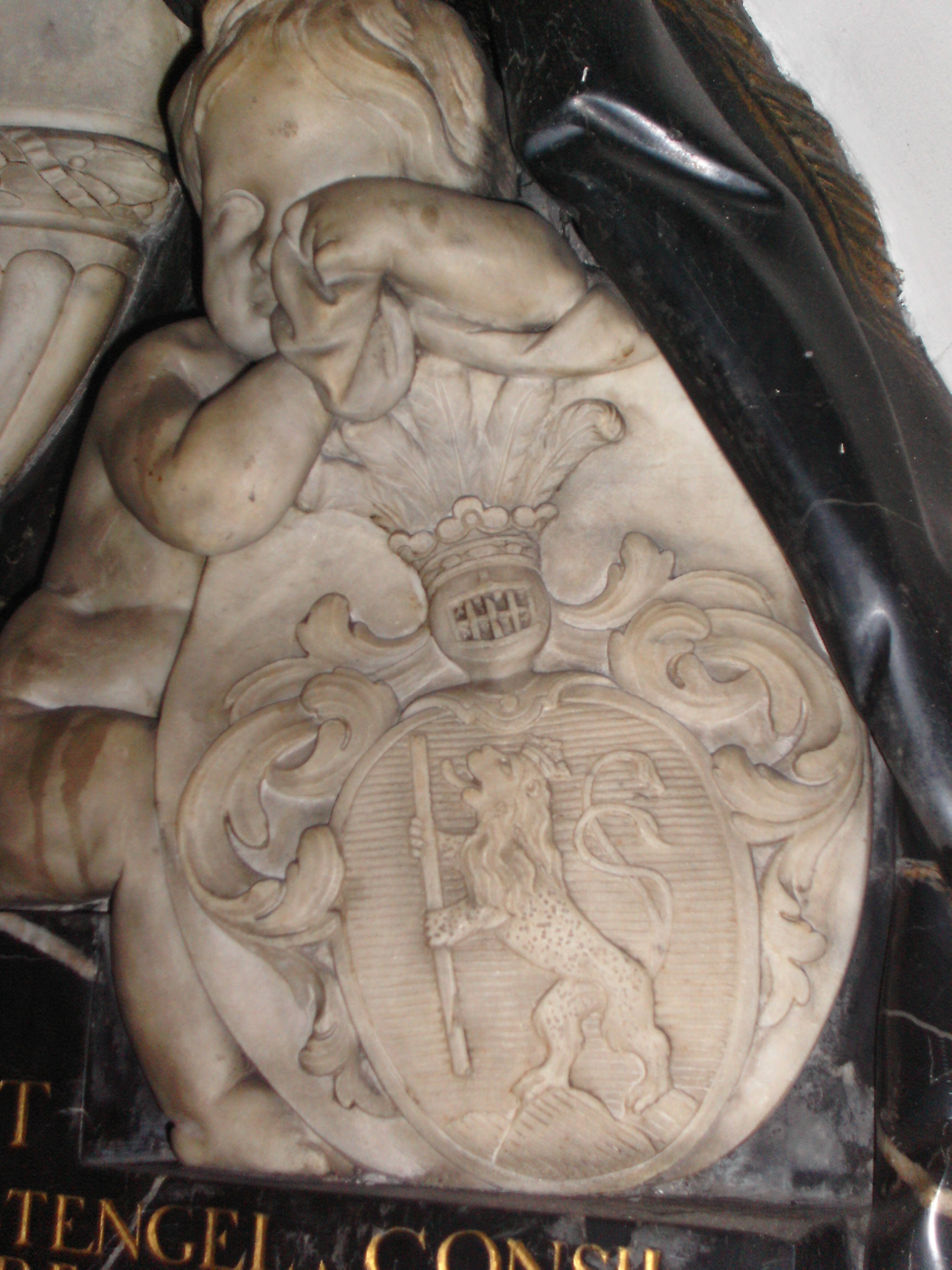 Wappen der Familie von Stengel Kurpfalz/Bayern/Mannheim, Mannheim, St. Sebastianskirche Epitaph